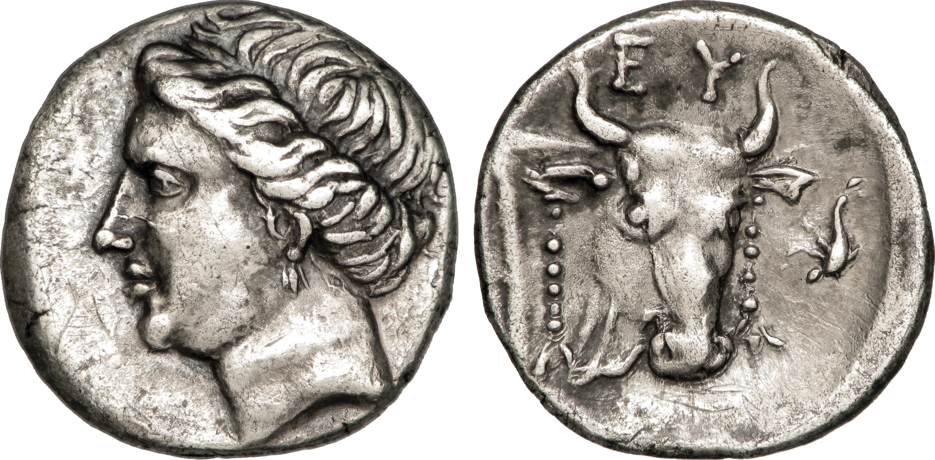 Nom de l'atelier : Eubée, Érétrie Métal : argent Diamètre : 17mm Axe des coins : 12h. Poids : 3,71g. Titulature avers : Anépigraphe. Description avers : Tête de la nymphe Euboia à gauche, coiffée de la tainia. Titulature revers : EY. Description revers : Tête de bovin à droite avec un bandelette posée sur chaque corne prêt pour le sacrifice ; dans le champ à droite, un petit dauphin posé verticalement ; le tout dans les restes d’un carré creux. Traduction revers : (Eubée).